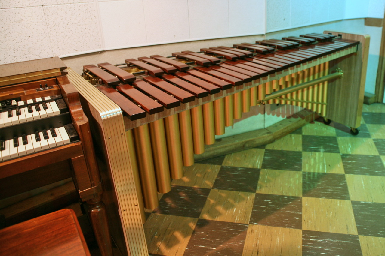 Vibraphone Marimba